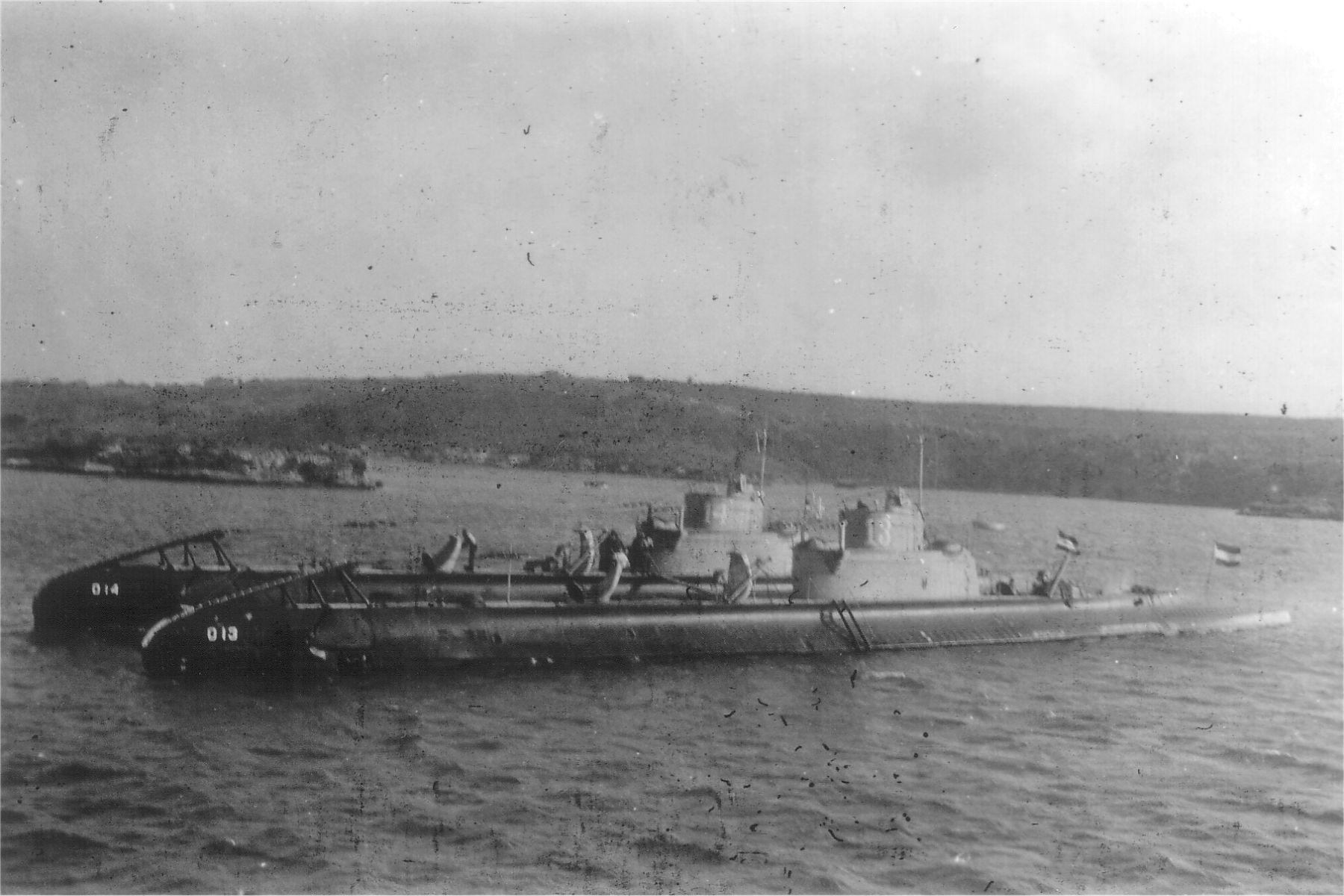 De O13 en 014 in het Schottegat te Curacao, eind juli 1939